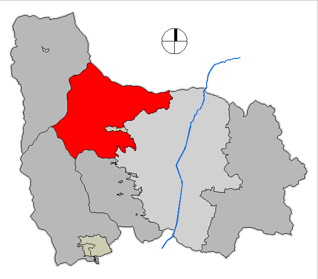 mapa del Corregimiento de San Cristobal. Medellín, Colombia.